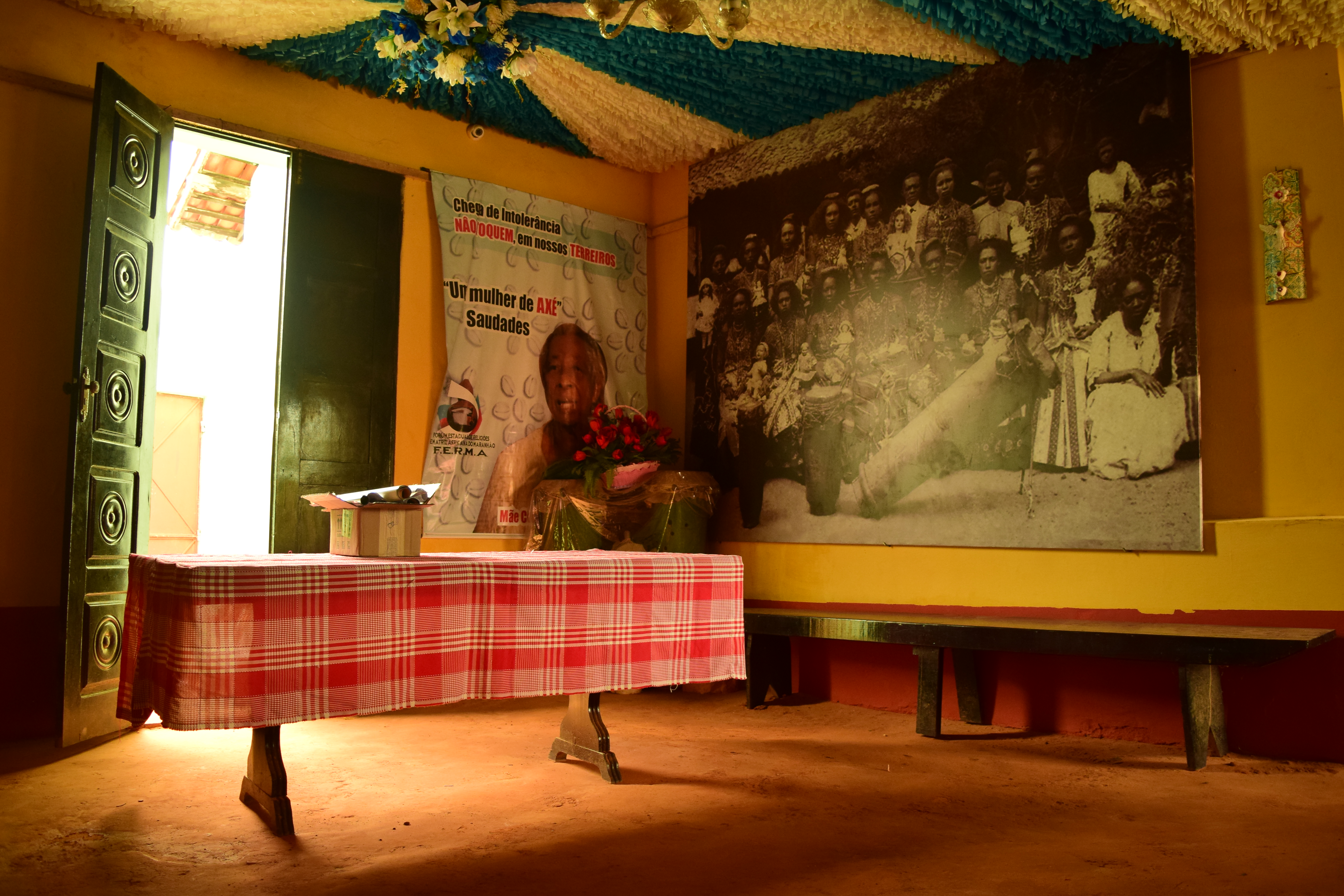 Terreiro Casa das Minas Jeje, situado na Rua de São Pantaleão nº 857 e 857A.